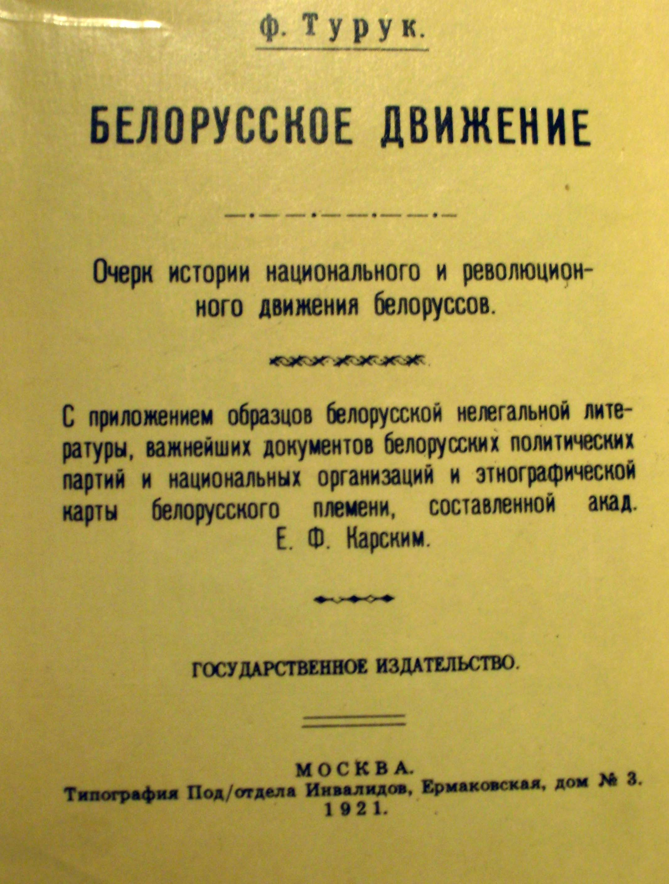 Беларуская (тарашкевіца): Ф. Турук - Беларускі Рух (Нарыс гісторыі нацыянальнага і рэвалюцыйнага рухаў Беларусі), 1921, Масква